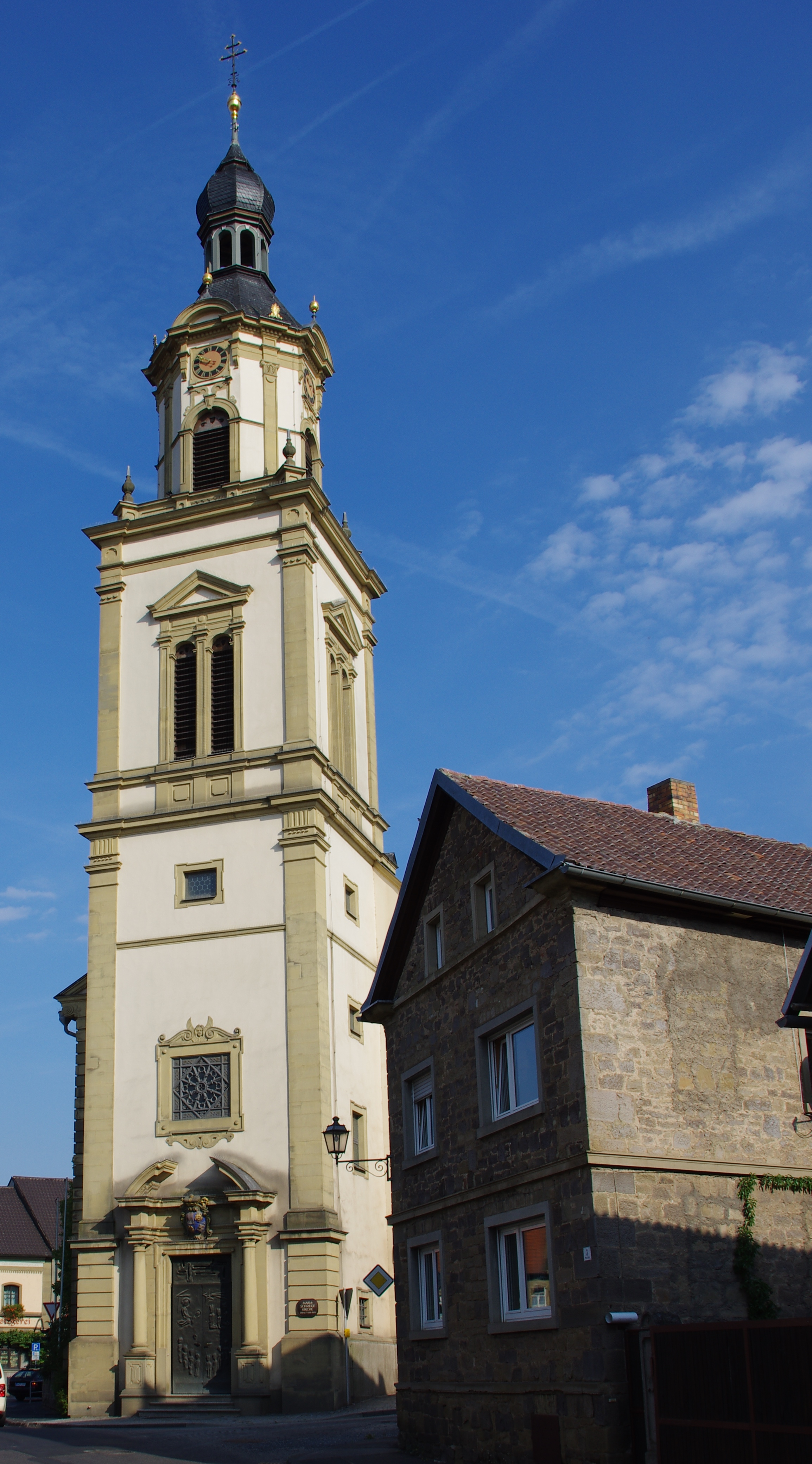 Saalbau mit eingezogenem Chor und südlich vorgelagertem Turm mit Welscher Haube, von Christian Hermann, 1688-93, Turm 1873 erneuert; mit Ausstattung Mainstraße 1/Hauptstraße, Bergrheinfeld, Unterfranken, Deutschland